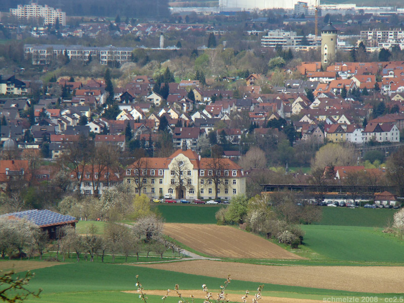 Wilhelmsruhe in Heilbronn-Sontheim, rechts im Hintergrund der Wasserturm von Heilbronn-Böckingen